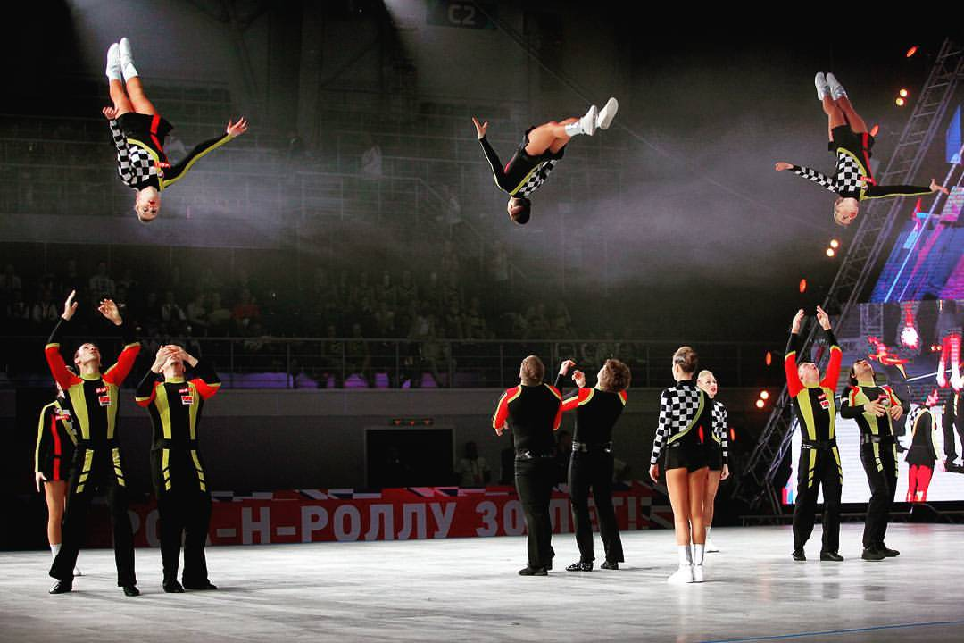 «Style Peppers» во время выступления принёсшего серебро на ЧМ 2016 по акробатическому рок-н-роллу